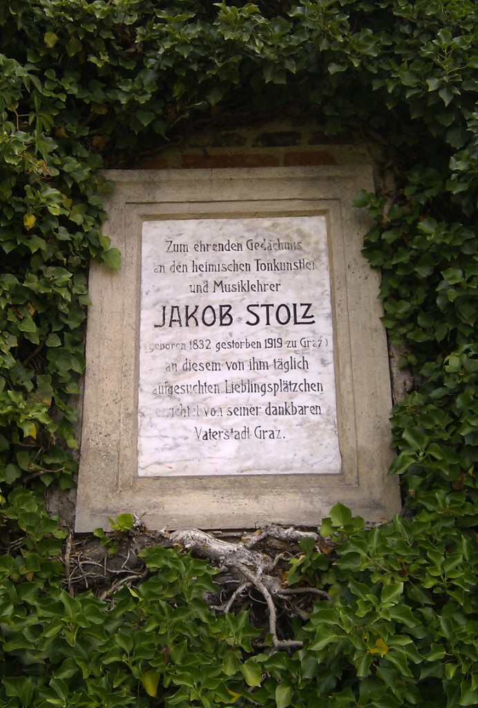 Jakob-Stolz-Tafel, Grazer Schloßberg